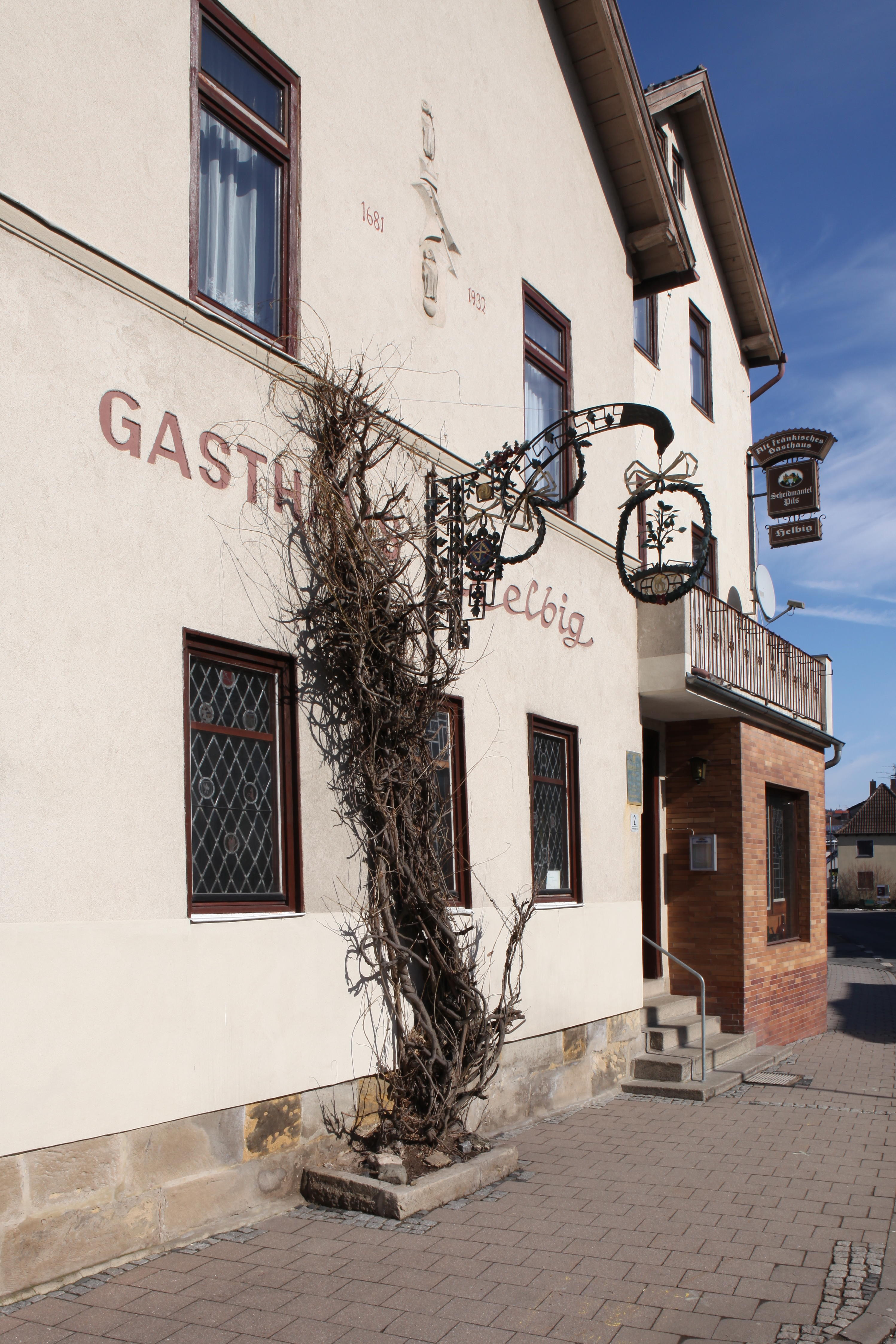 Gasthaus Helbig mit denkmalgeschütztem, klassizistischm Wirtshausschild in Weitramsdorf, Lkr. Coburg